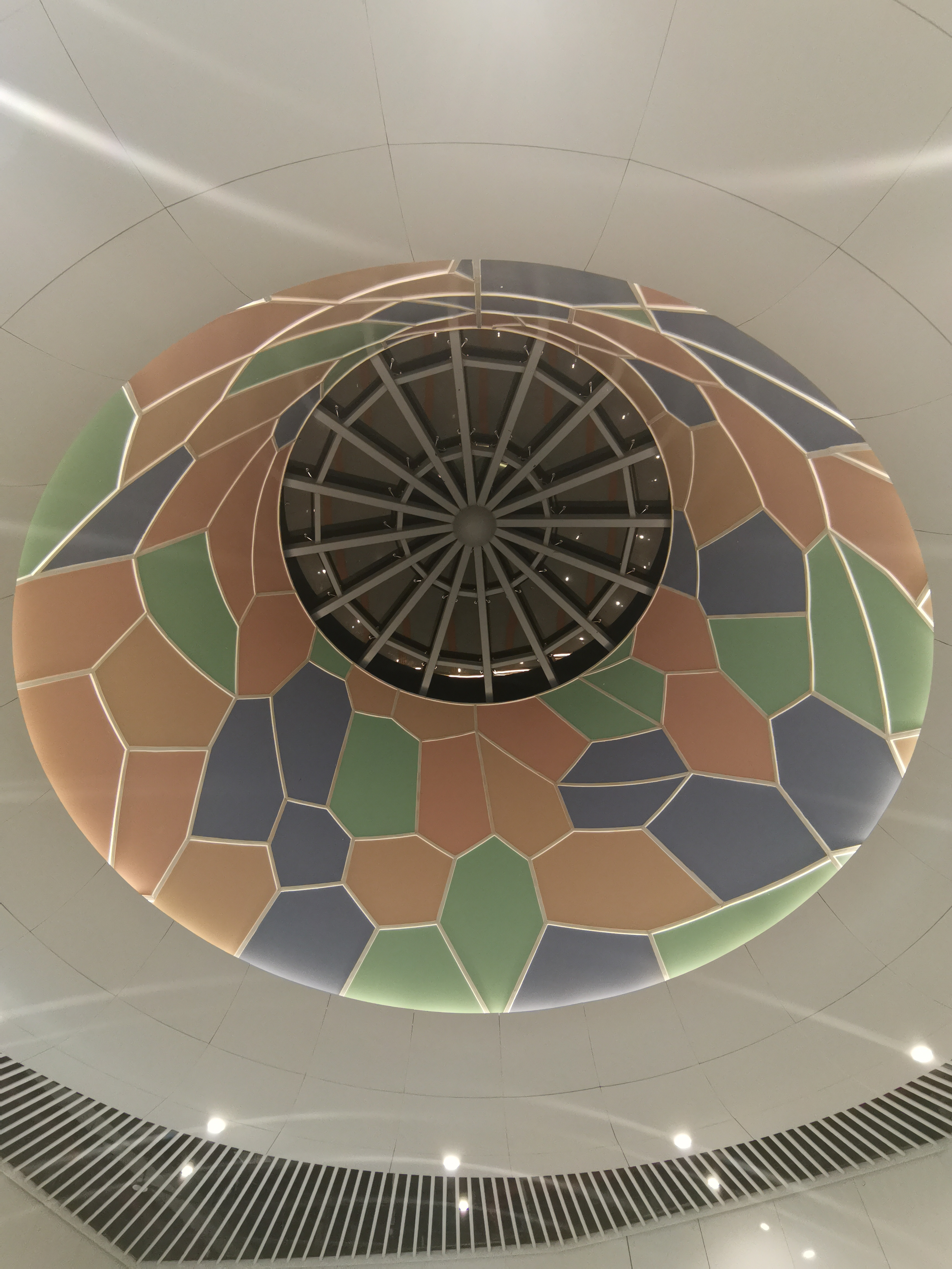 南宁轨道交通3号线长堽路站采光口